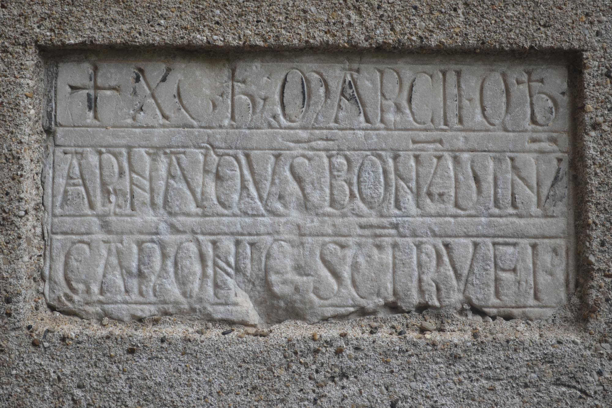 Inscription, mur de l’ancienne église Saint-James puis abbaye Saint-Ruf de Valence (Drôme) : Arnaudus Bonum Vinum (Arnaud Bon Vin), chanoine de Saint-Ruf